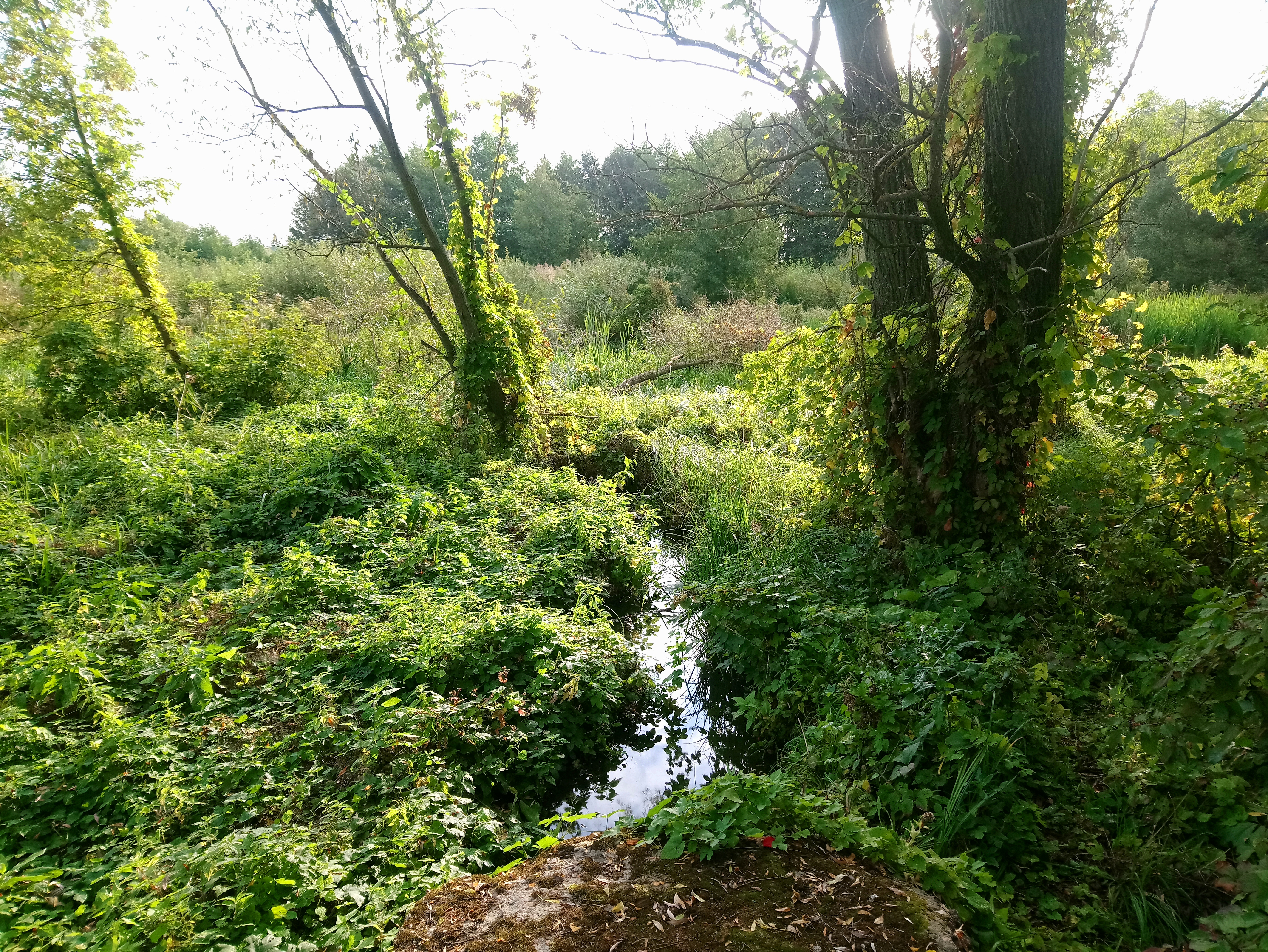 Русло реки Конотопка в городе Конотоп